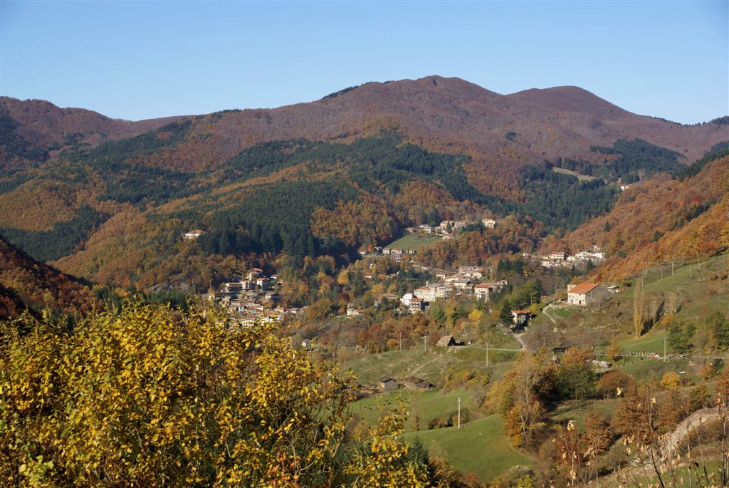 Giordano Giacomini, scatto proprio, Badia Prataglia immerso nella Foresta Riserva Biogenetica di Badia Prataglia (Riserva naturale Badia Prataglia), caricata da utente lineagoticafight autorizzato dall'autore